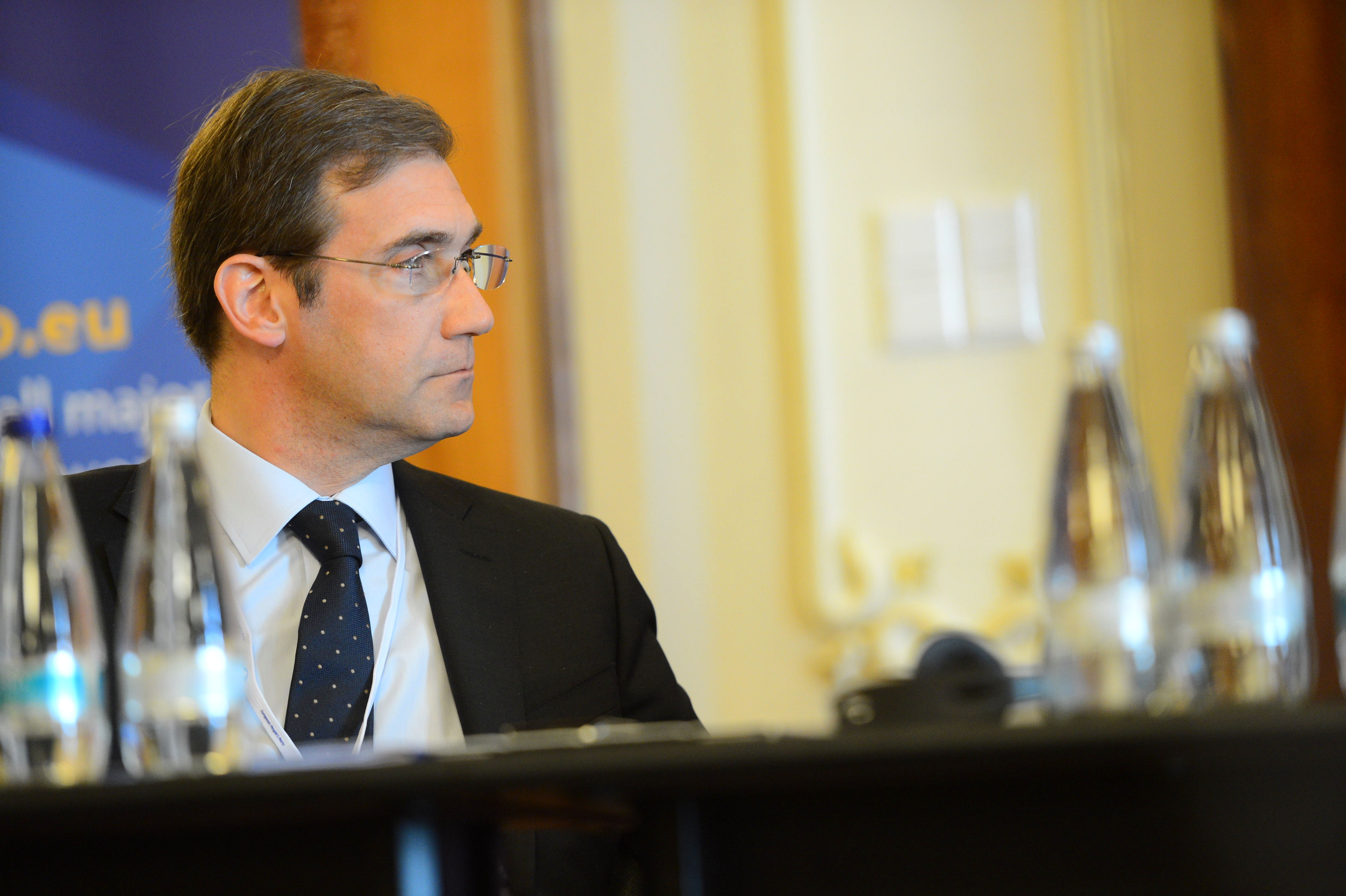 Pedro Passos Coelho